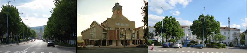 orașul Ștei Bihor centrul